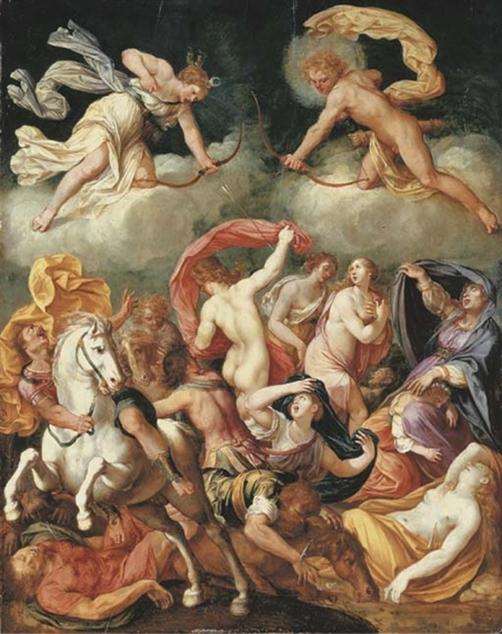 De ondergang van de kinderen van Niobe door Bernardino Cesari